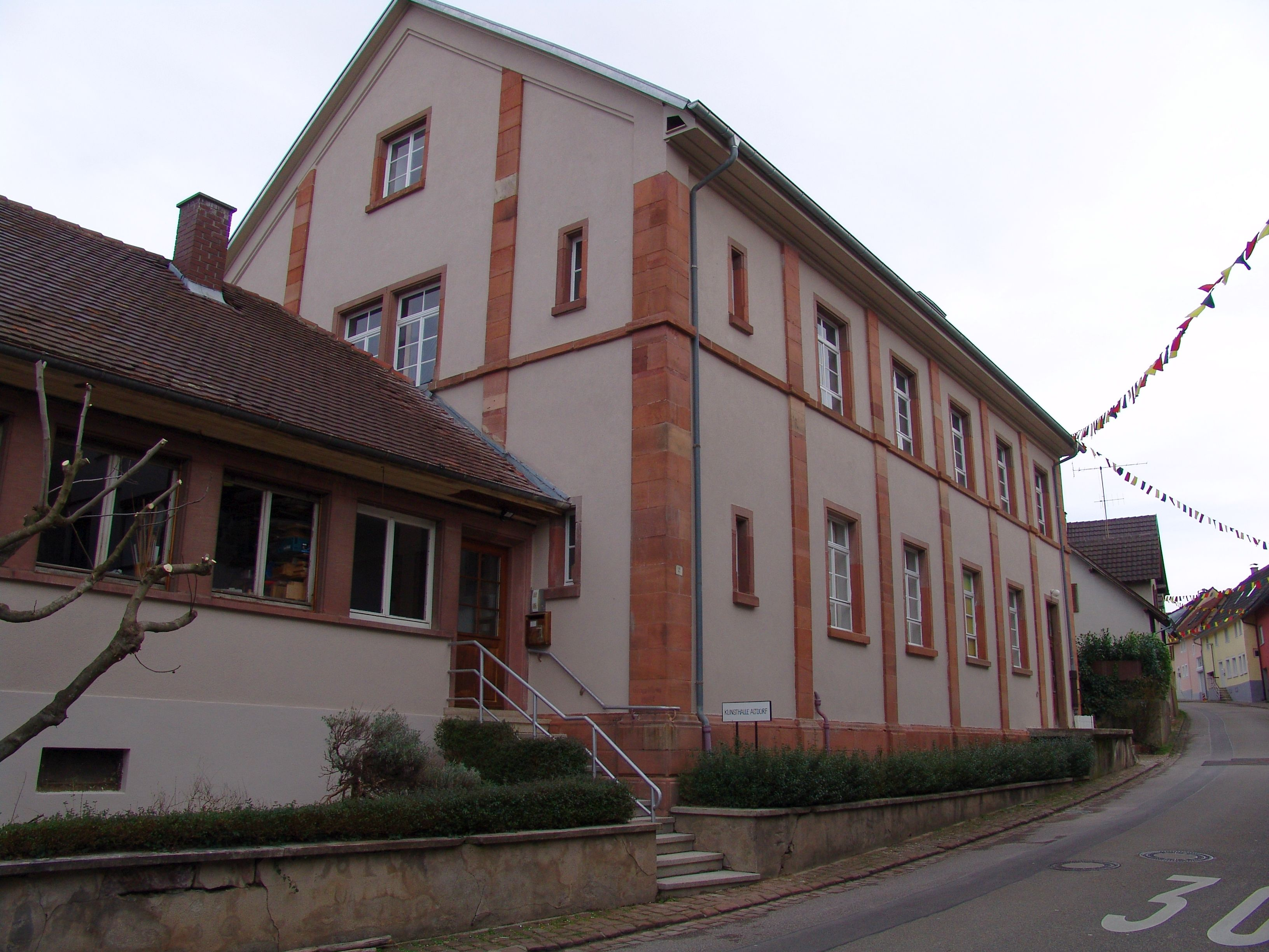 Ehemalige Synagoge Altdorf (Vorderseite). Inzwischen Kunsthalle Ettenheim/Altdorf.